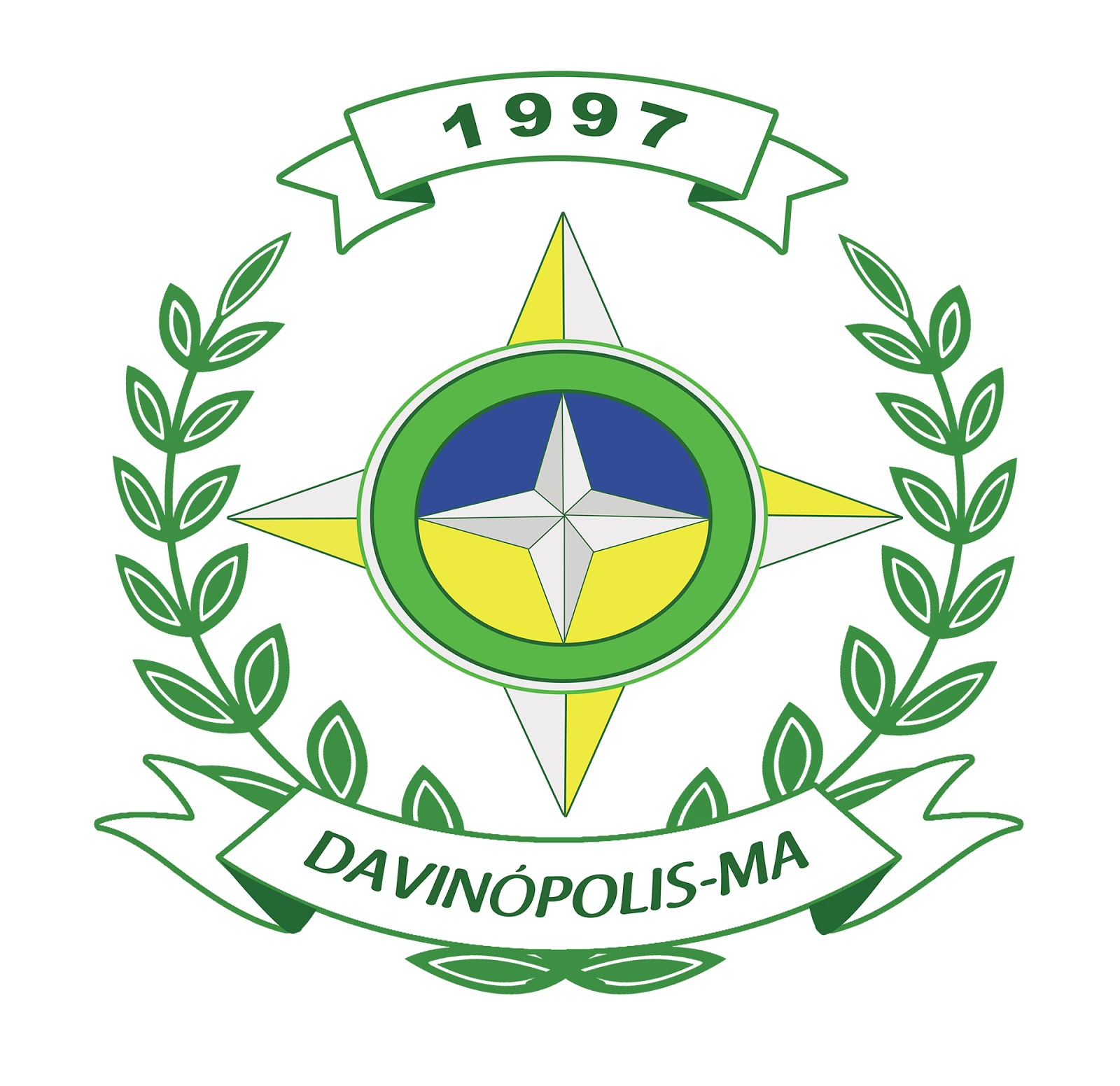 Brasão Oficial de Davinópolis Maranhão